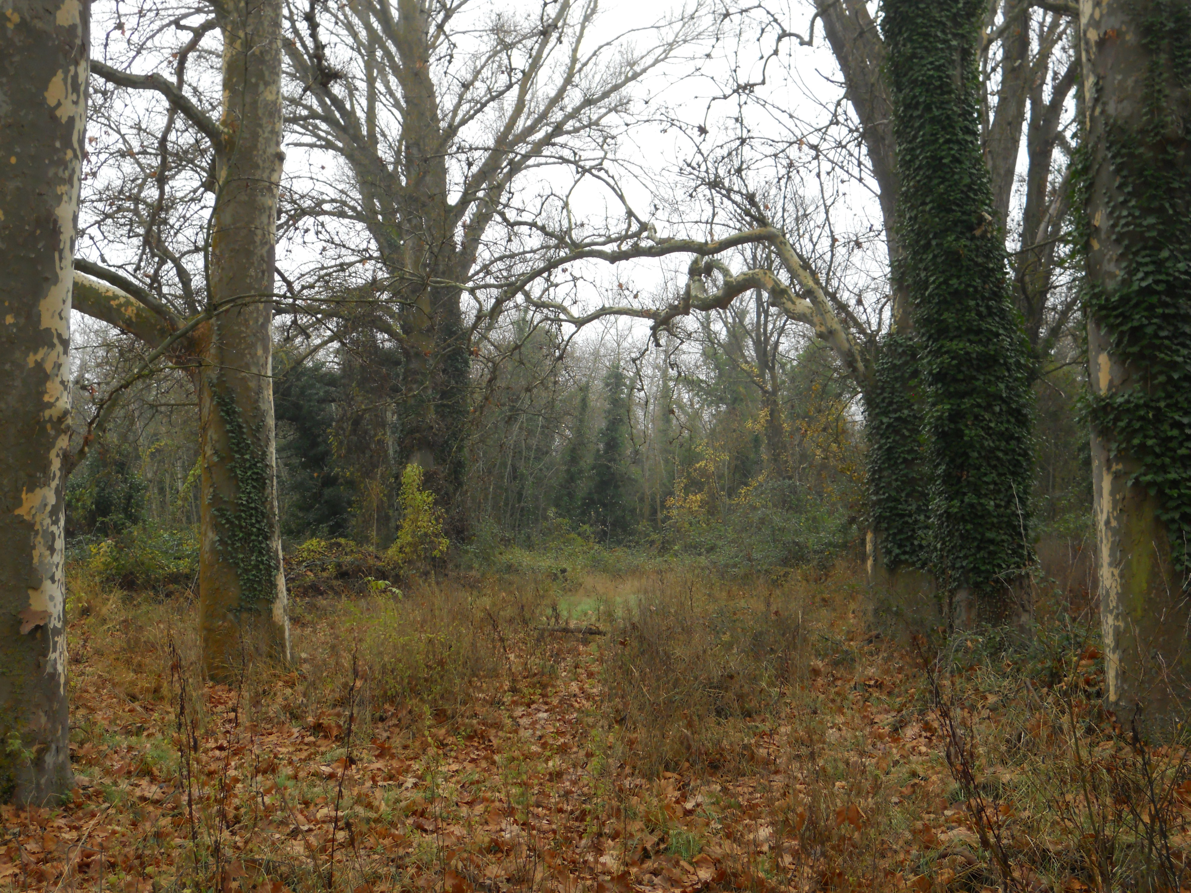 Plátanos hispánicos en Tudela